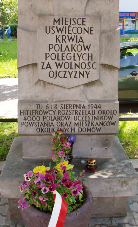 Miejsce uświęcone krwią Polaków przy ul. Wolskiej 75 w Warszawie (fot Zu)